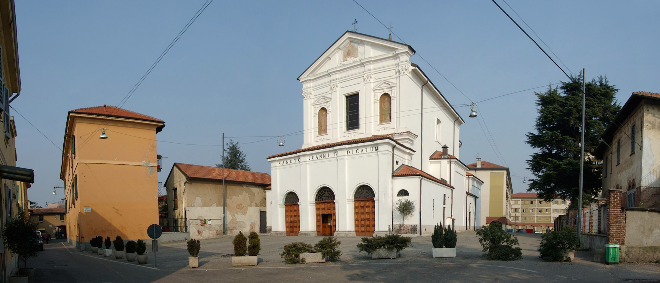 Piazza della chiesa San Giovanni Milano Trenno Italia